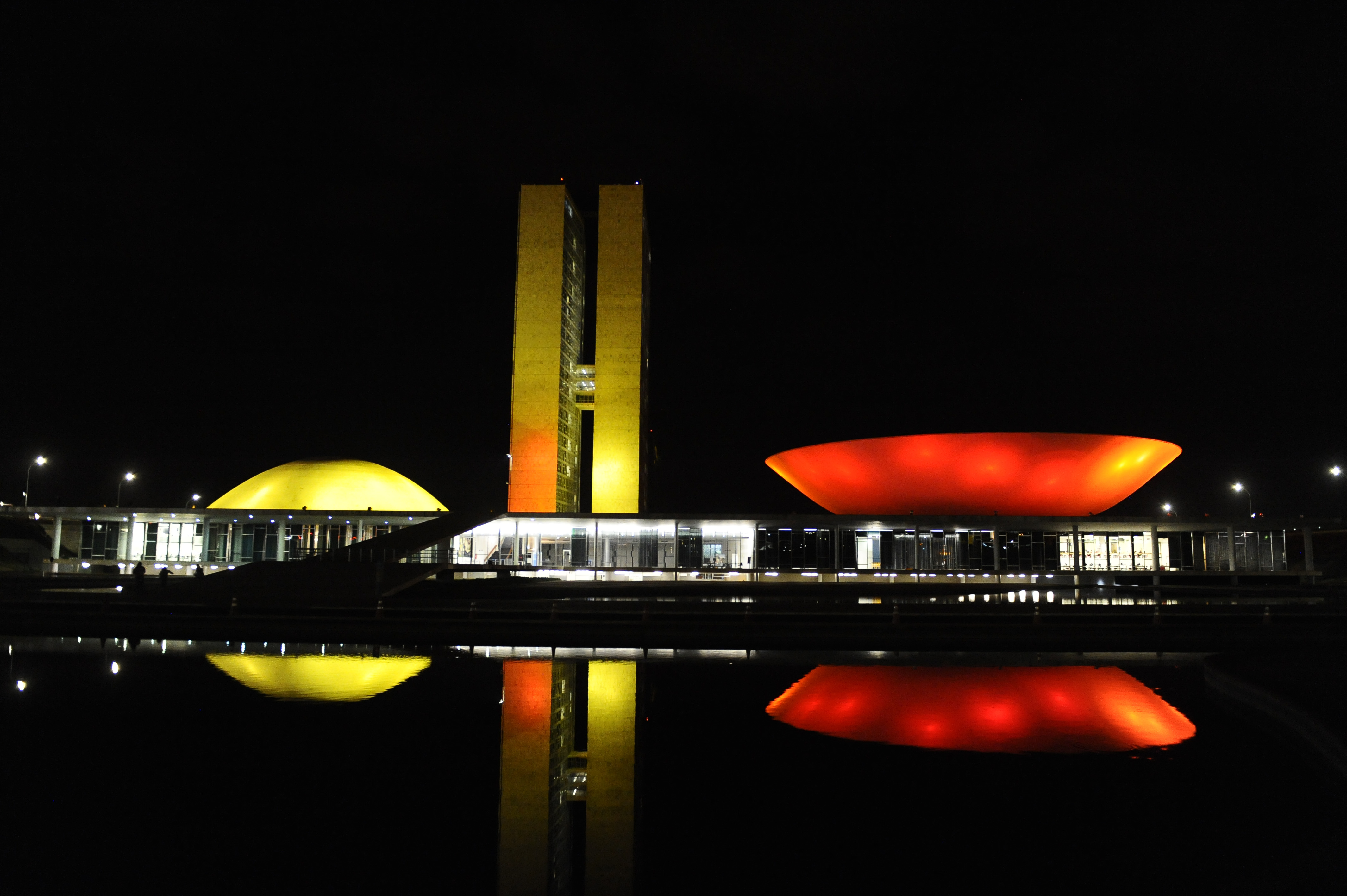 Congresso Nacional tem iluminação especial em solidariedade às vitimas do atentado em Barcelona. Fotos: Jonas Pereira/Agência Senado